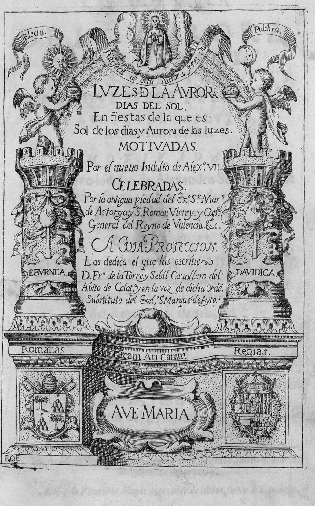 Frontis de Francisco de la Torre y Sevil, "Luzes de la aurora, dias de sol, en fiestas de la que es sol de los dias y aurora de las luzes, Maria Santissima motiuadas por el nuevo indulto de Alexandro Septimo...." Grabado calcográfico firmado FQF [Francisco Quesádez]. En Valencia, por Gerónimo Vilagrasa,1665.